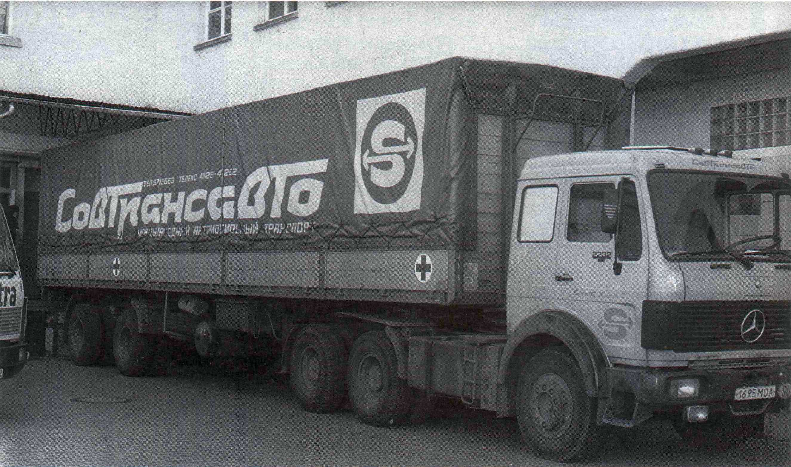 Zeitgleich mit den Schweizer Kollegen hatten Mitglieder das Kürschnerhandwerk und die Rauchwarenwirtschaft ihre Mitglieder 1988 zu Pelzspenden zugunsten der Erdbebenopfer in Armenien aufgerufen. Etwa 21.500 Jacken, Mäntel und Mützen waren in Deutschland zusammengekommen. Im Pelzzentrum der Frankfurter Niddastraße wurden die Teile versandfertig gemacht. Vor Weihnachten wurden sie mit zwei Lastzügen einer sowjetischen Spedition nach dort verbracht, Mitarbeiter des „Roten Kreuzes“ halfen beim Verladen und hatten ihre Unterstützung beim Verteilen vor Ort zugesagt. Bildunterschrift: Kein Fall für die enge Niddastraße, der riesige Lastzug an der Laderampe.